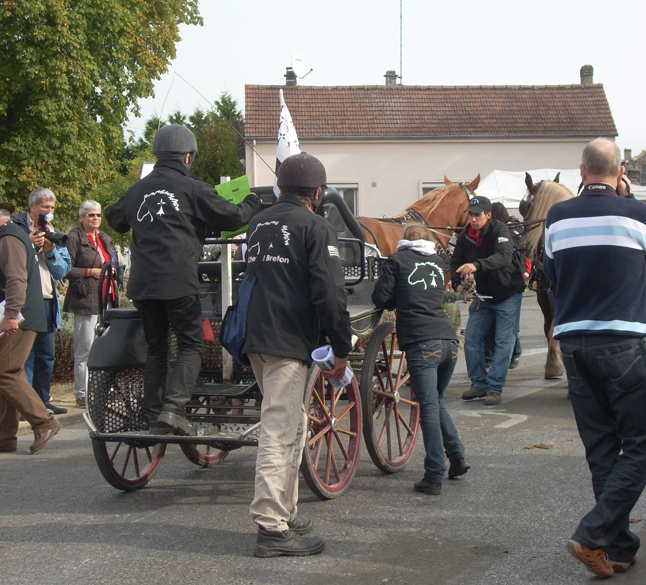 Equipe bretonne durant la route du Poisson 2012, à Lacroix-Saint-Ouen